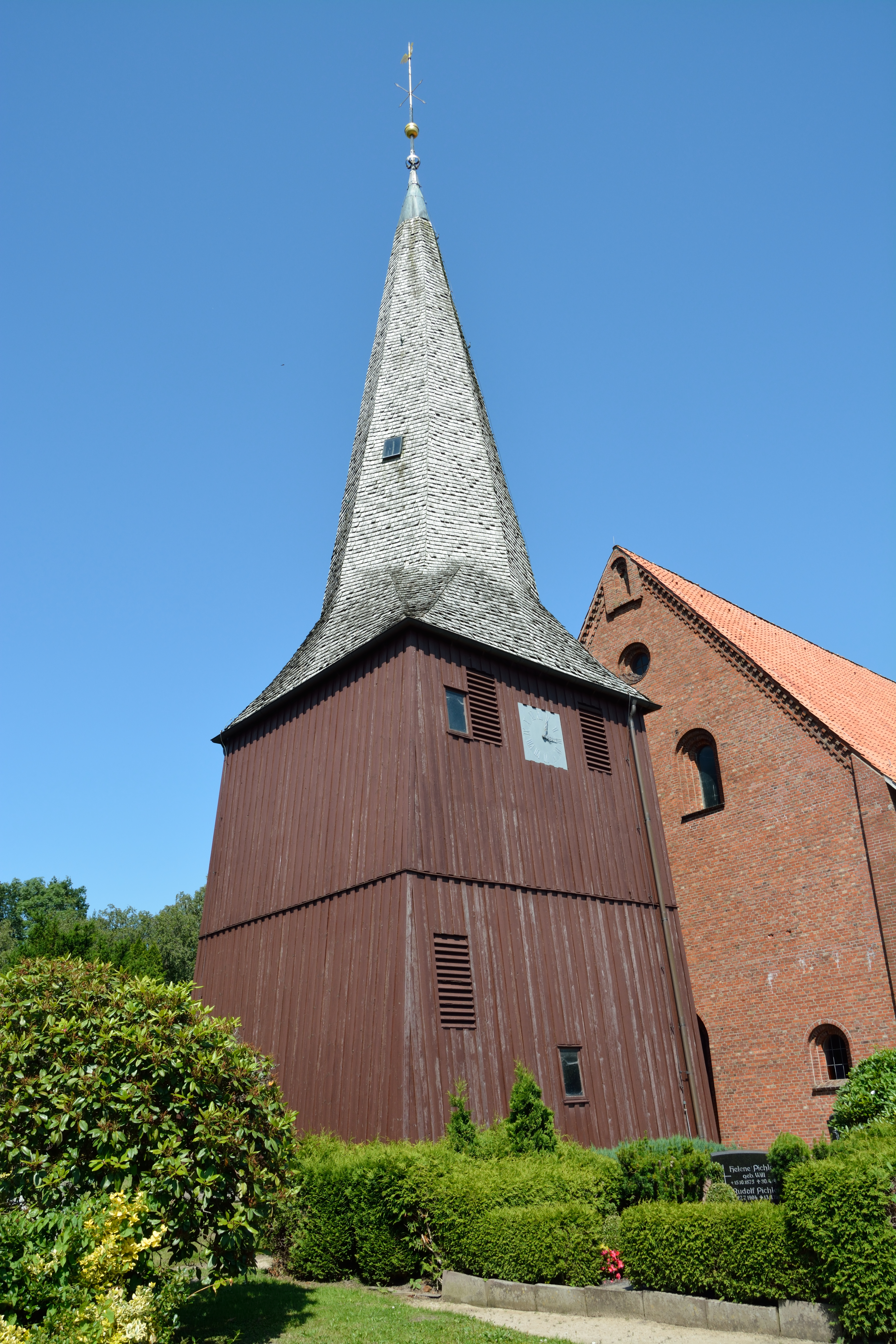 Bahrenfleht, Kirche St. Nicolai